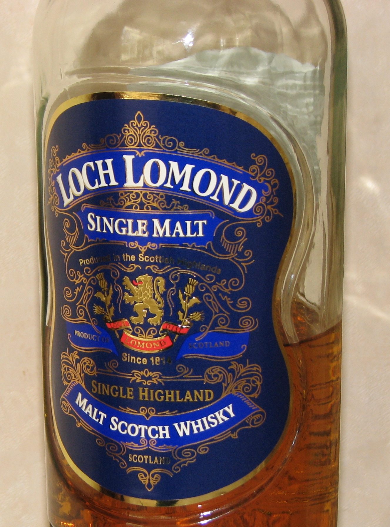 Loch Lomond Whisky Label